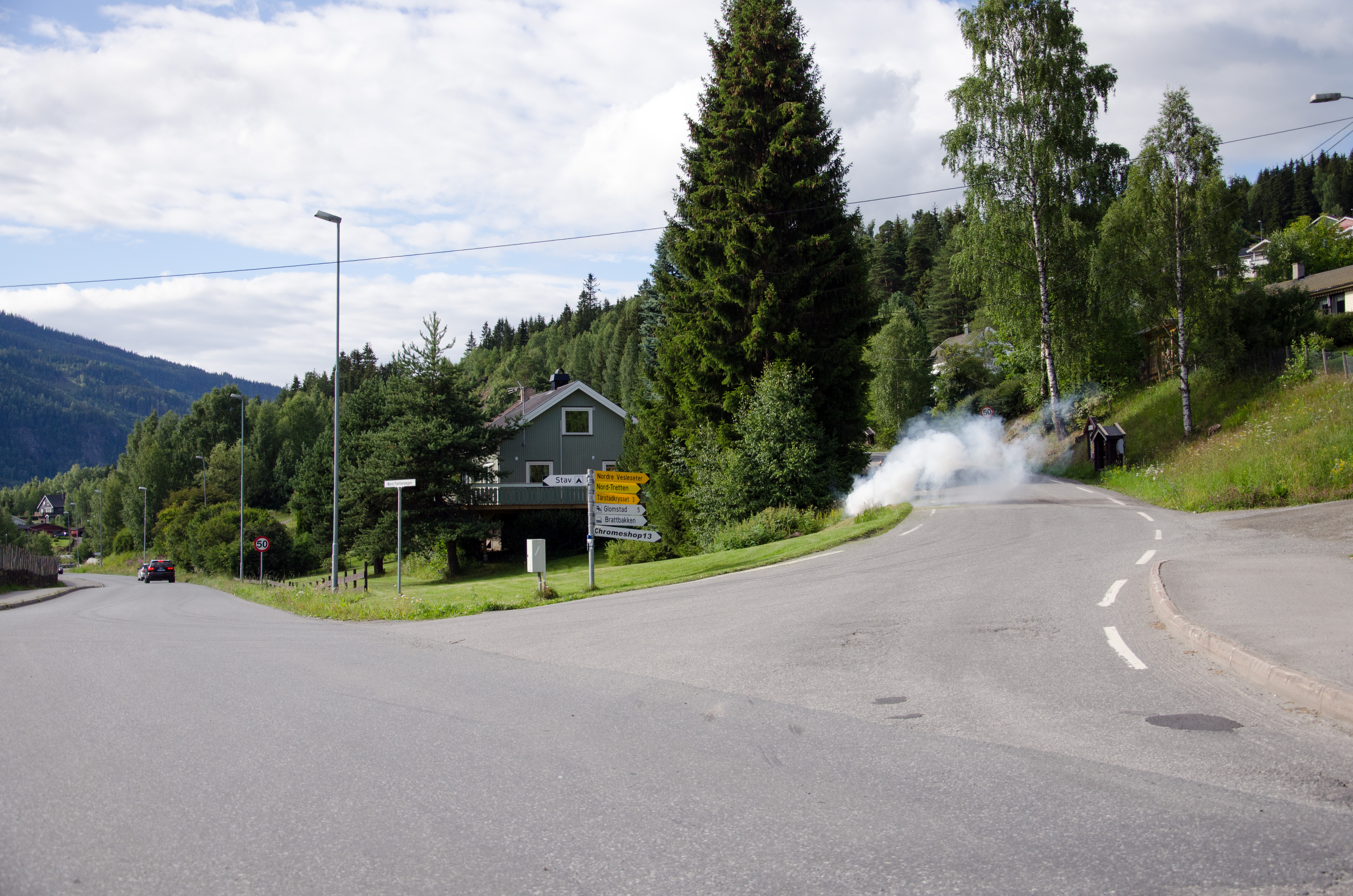 Fv357 Nord-Trettenvegen